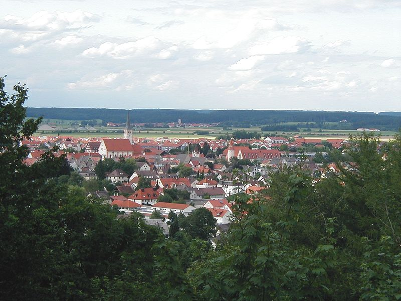 Stadtansicht Mindelheim